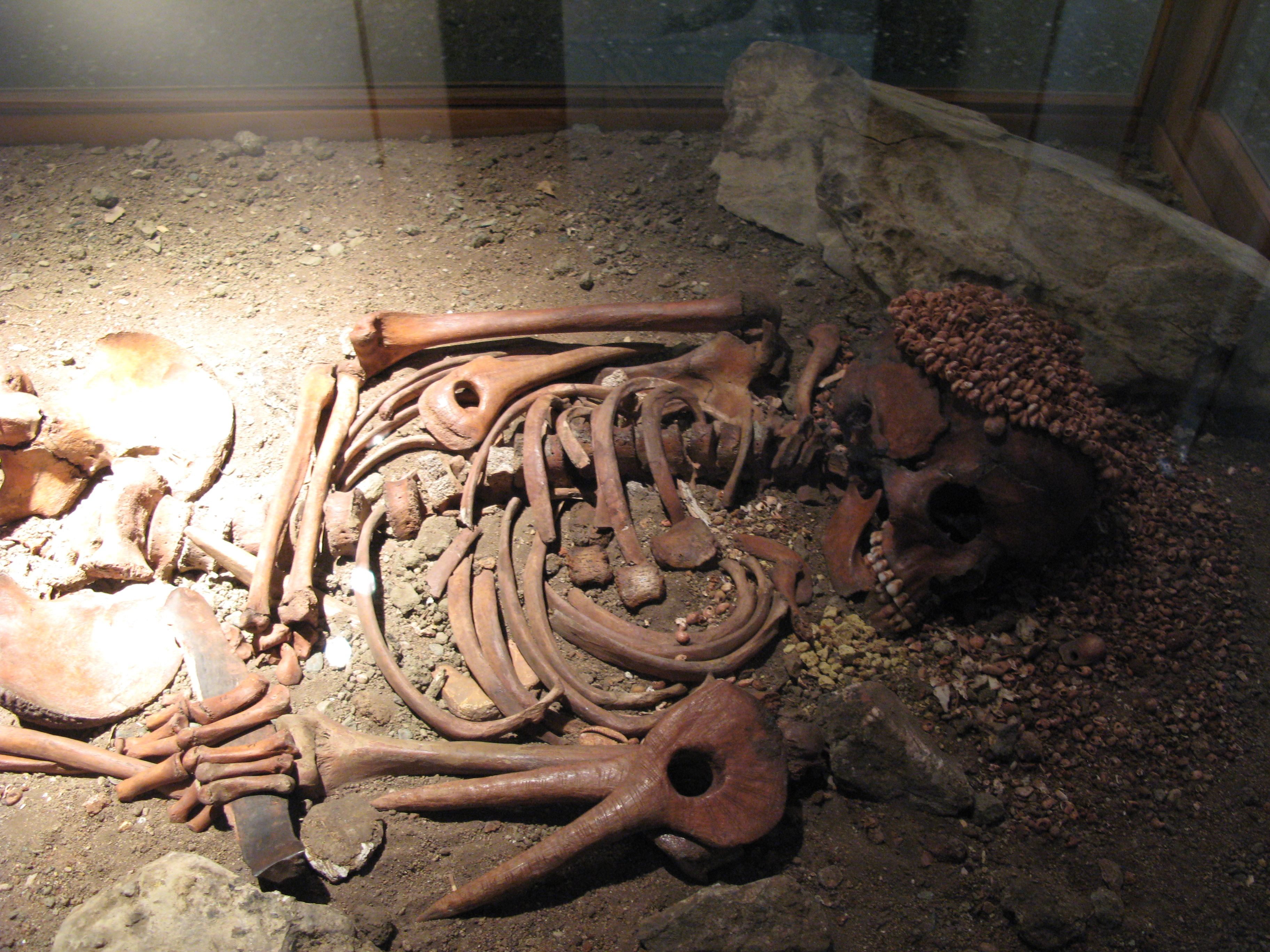 I ritrovamenti del "Piccolo Principe" presso la caverna delle Arene Candide (Finale Ligure) esposti al Museo di archeologia ligure di Genova Pegli, Liguria, Italia